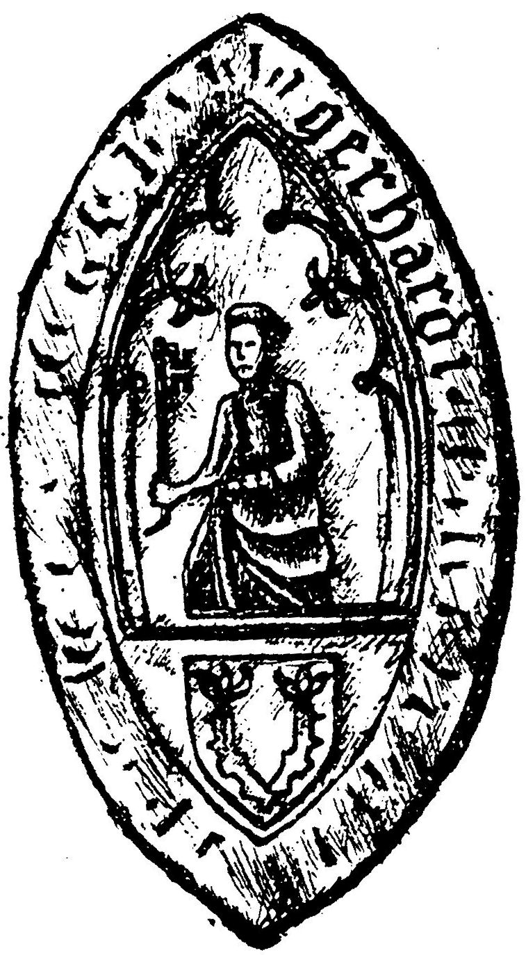 Siegel des Bischofs Gerhard III. von Hoya (um 1360-1398)